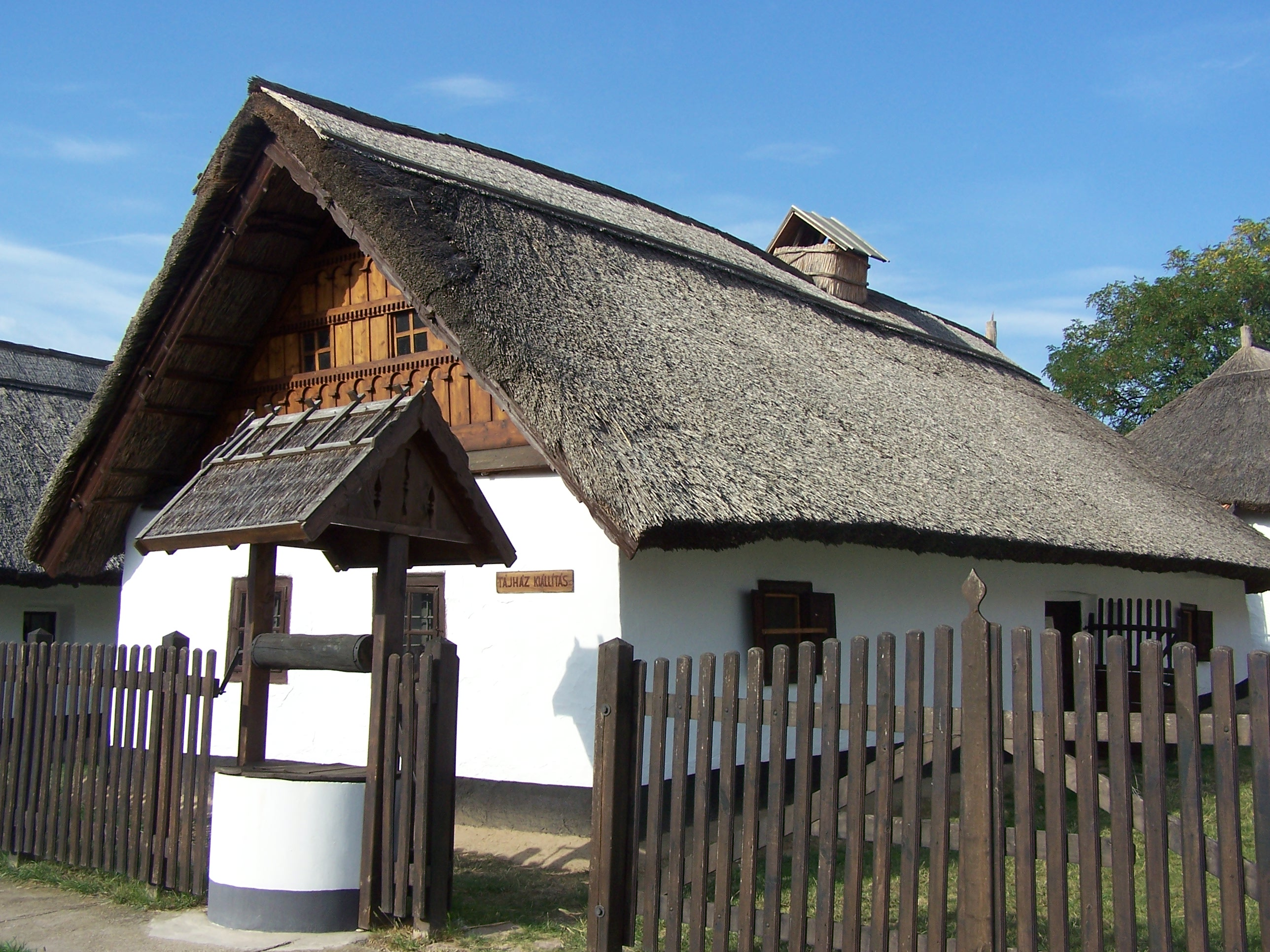 lakóház (Tard, Béke utca 55.) This is a photo of a monument in Hungary, Identifier: 3228